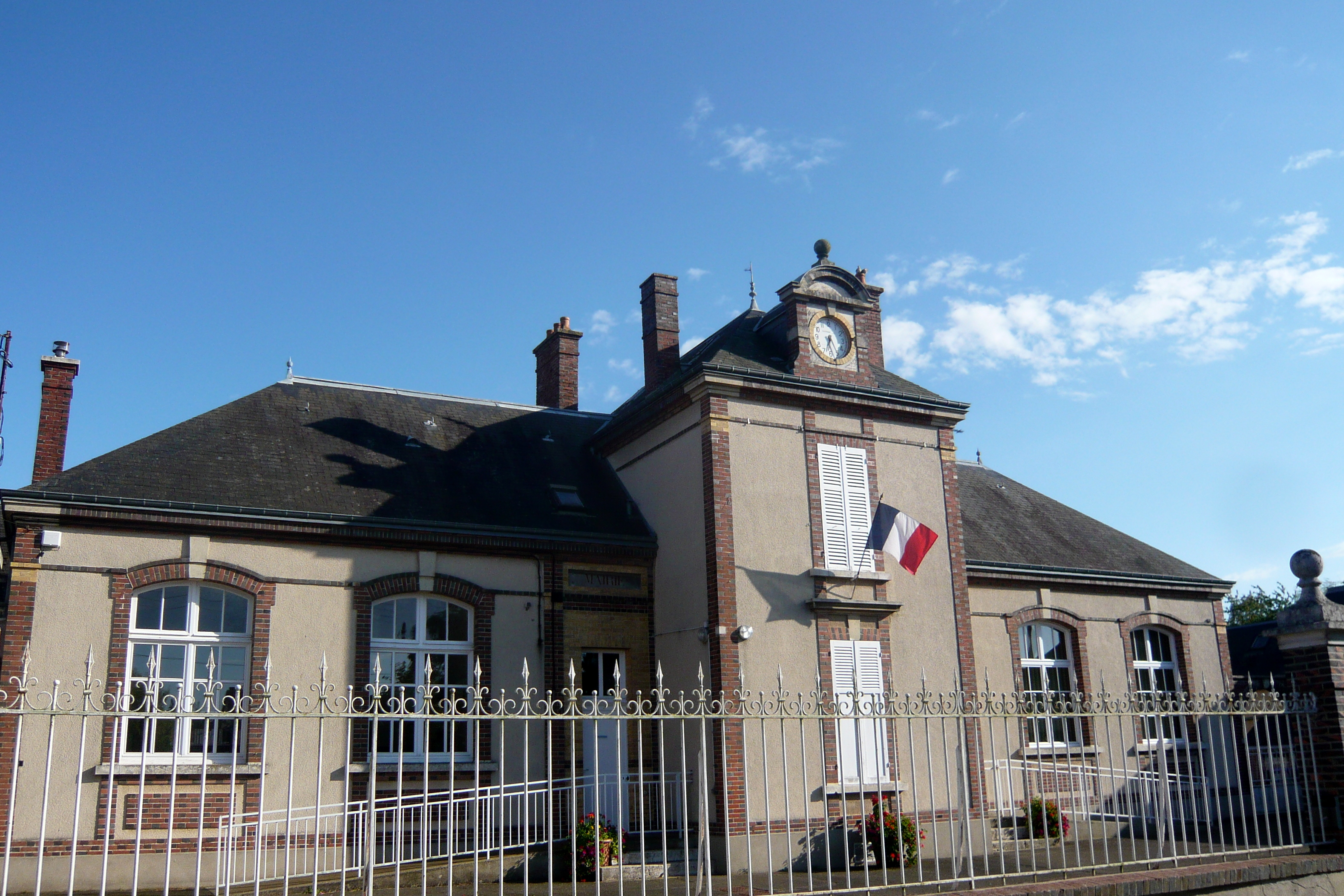 Mairie de Chartainvilliers, Eure-et-Loir (France).